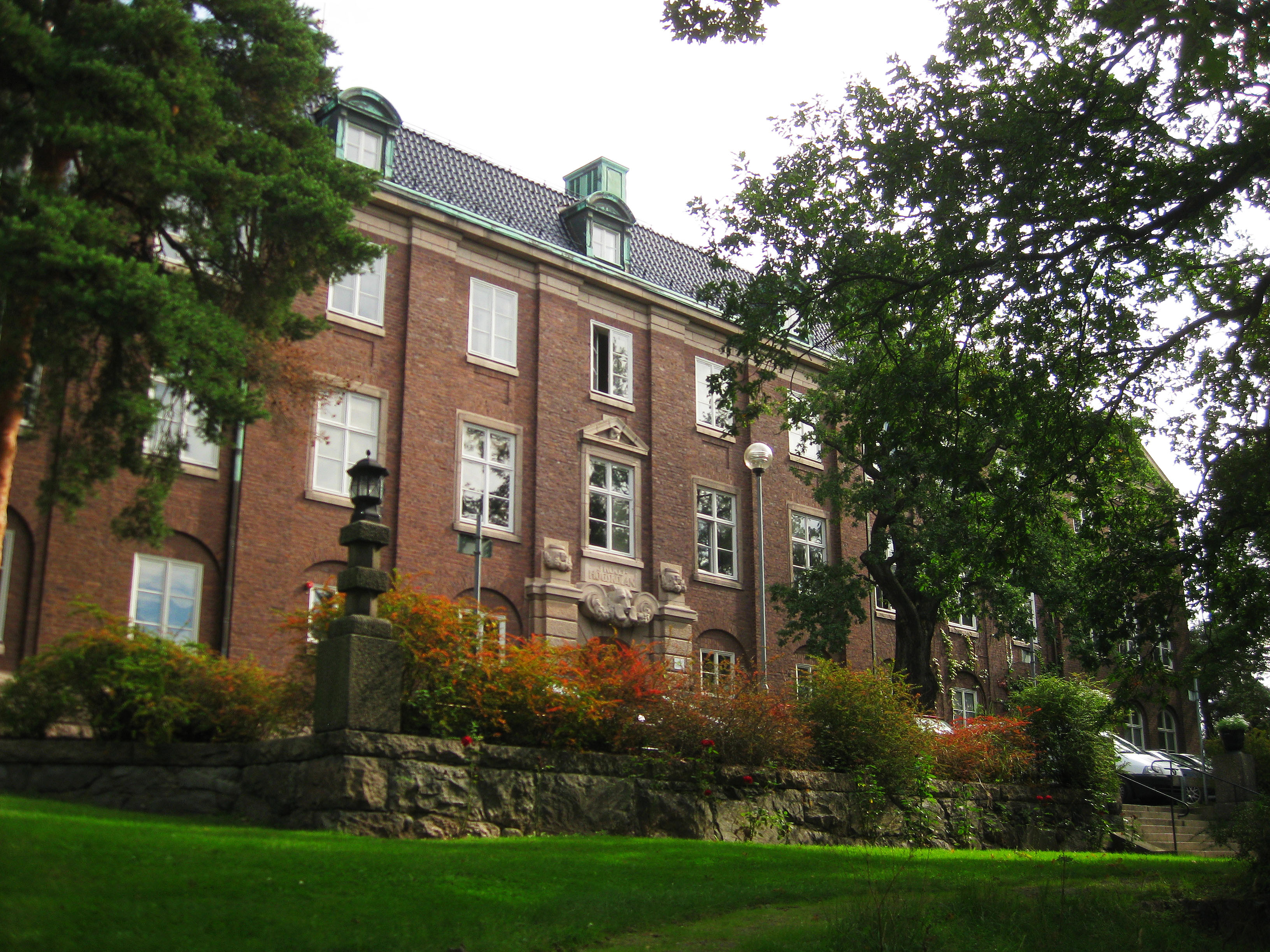 Frescati hage husnr 1 (Skogshögskolan) från väst